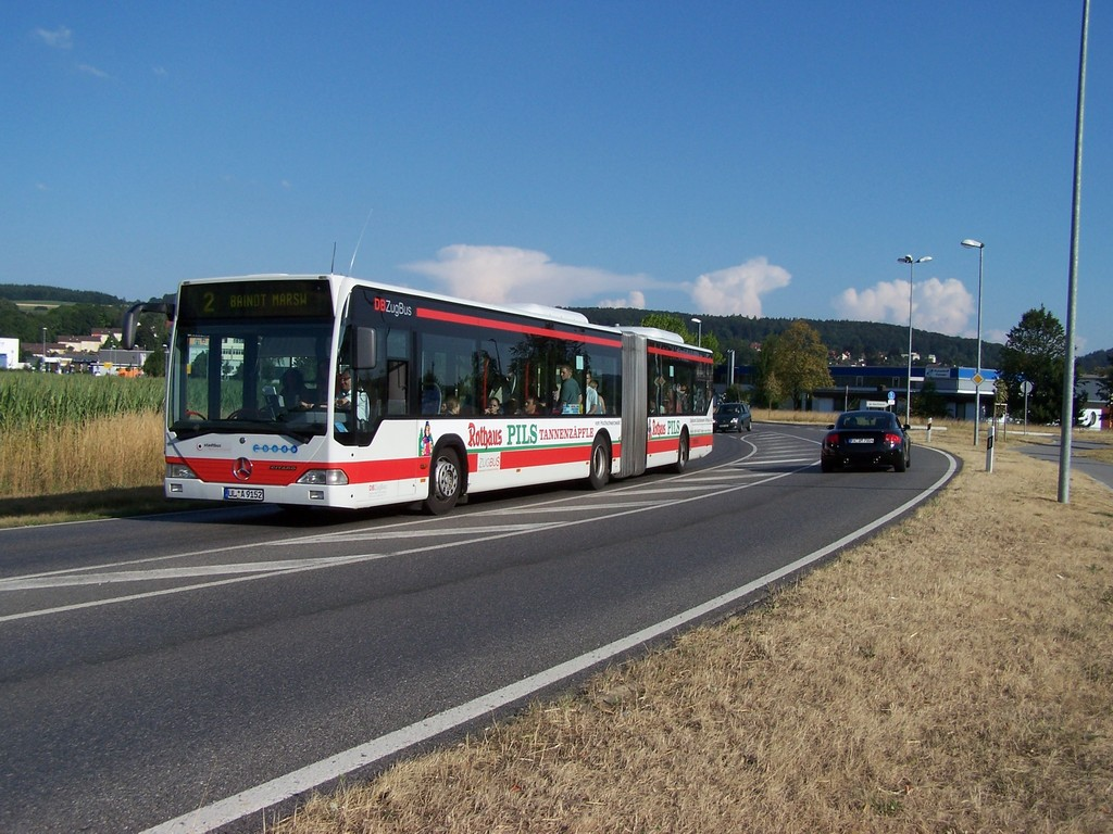 Citaro G Stadtniederflurgelenkbus des Stadtbus Ravensburg/Weingarten in Weingarten in der Mochenwangener Straße